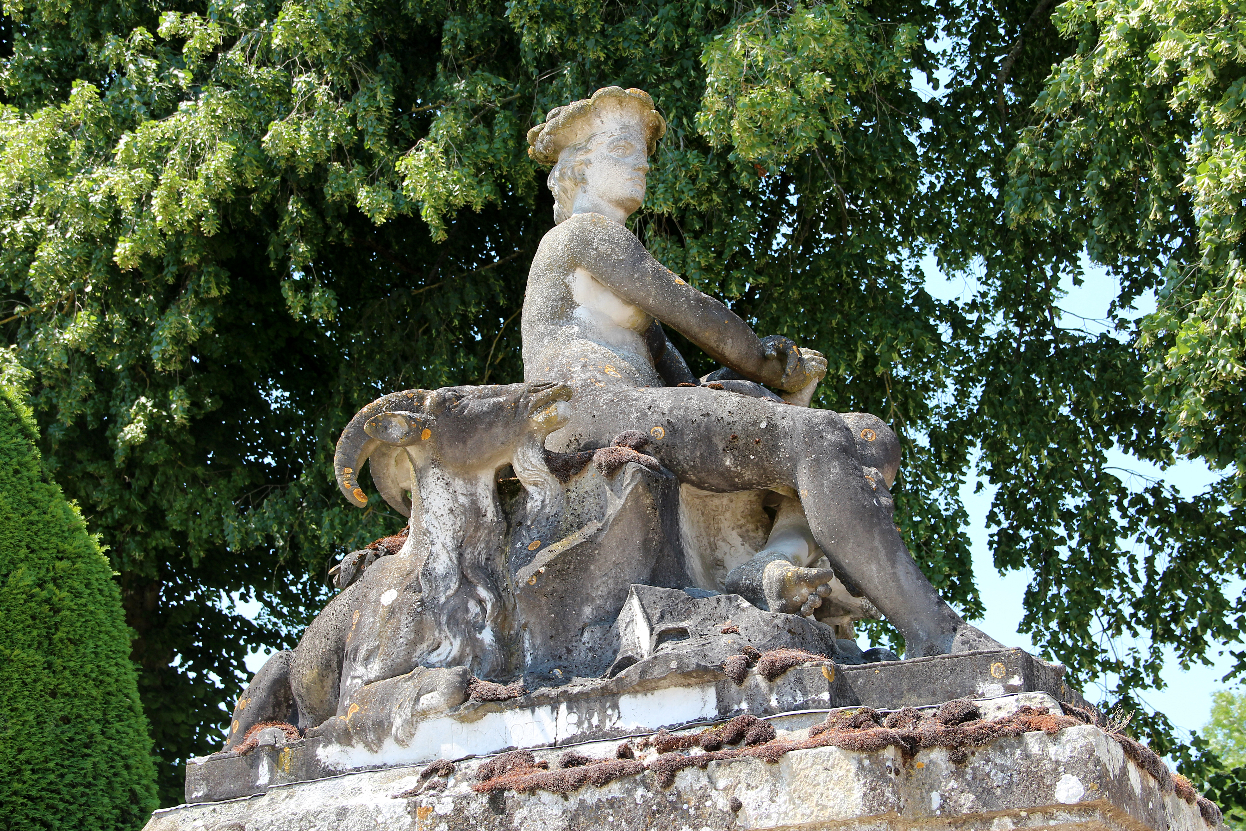 « L’Amérique », sculpture réalisée par Émile Peynot pour orner le petit escalier occidental permettant d’accéder aux grottes et au bassin de la Gerbe des jardins du château de Vaux-le-Vicomte - Maincy (Seine-et-Marne, France).